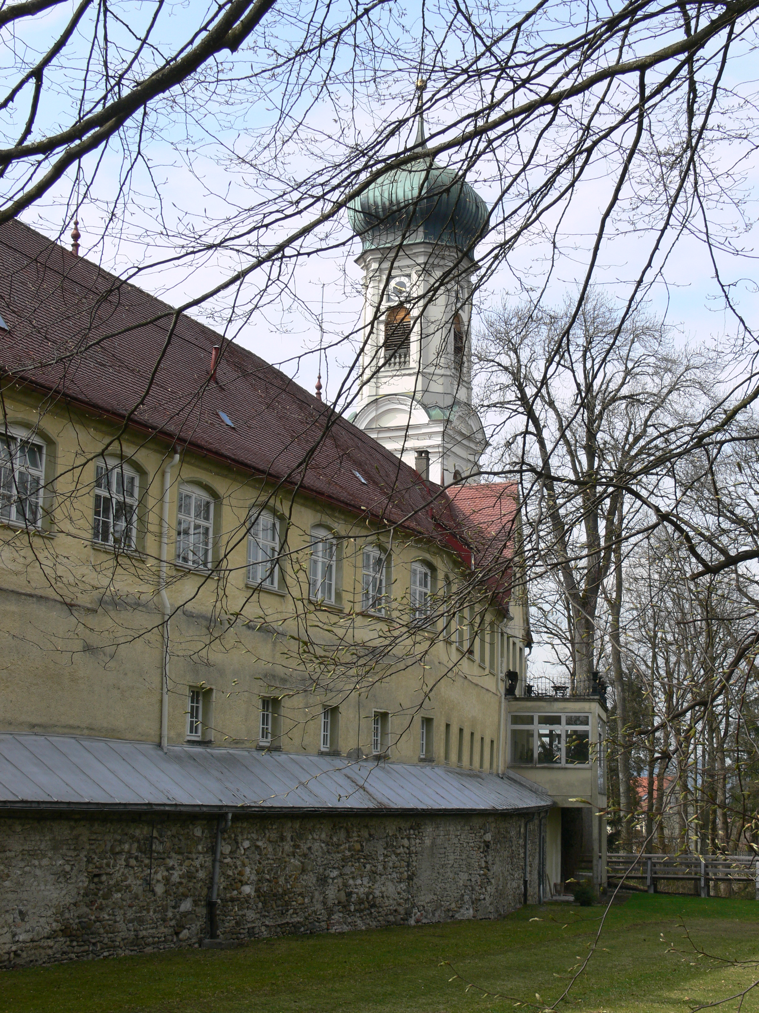 Isny im Allgäu, ehem. Benediktinerkloster St. Georg („Schloss Isny“)